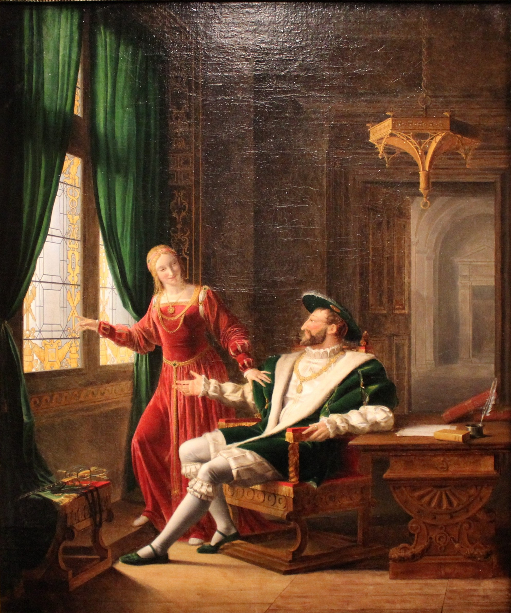 François Ier montre à Marguerite de Navarre, sa sœur, les vers qu'il vient d'écrire sur une vitre avec son diamant, œuvre de 1804 par Fleury François Richard, exposée au Musée des beaux arts de Lyon en 2014.